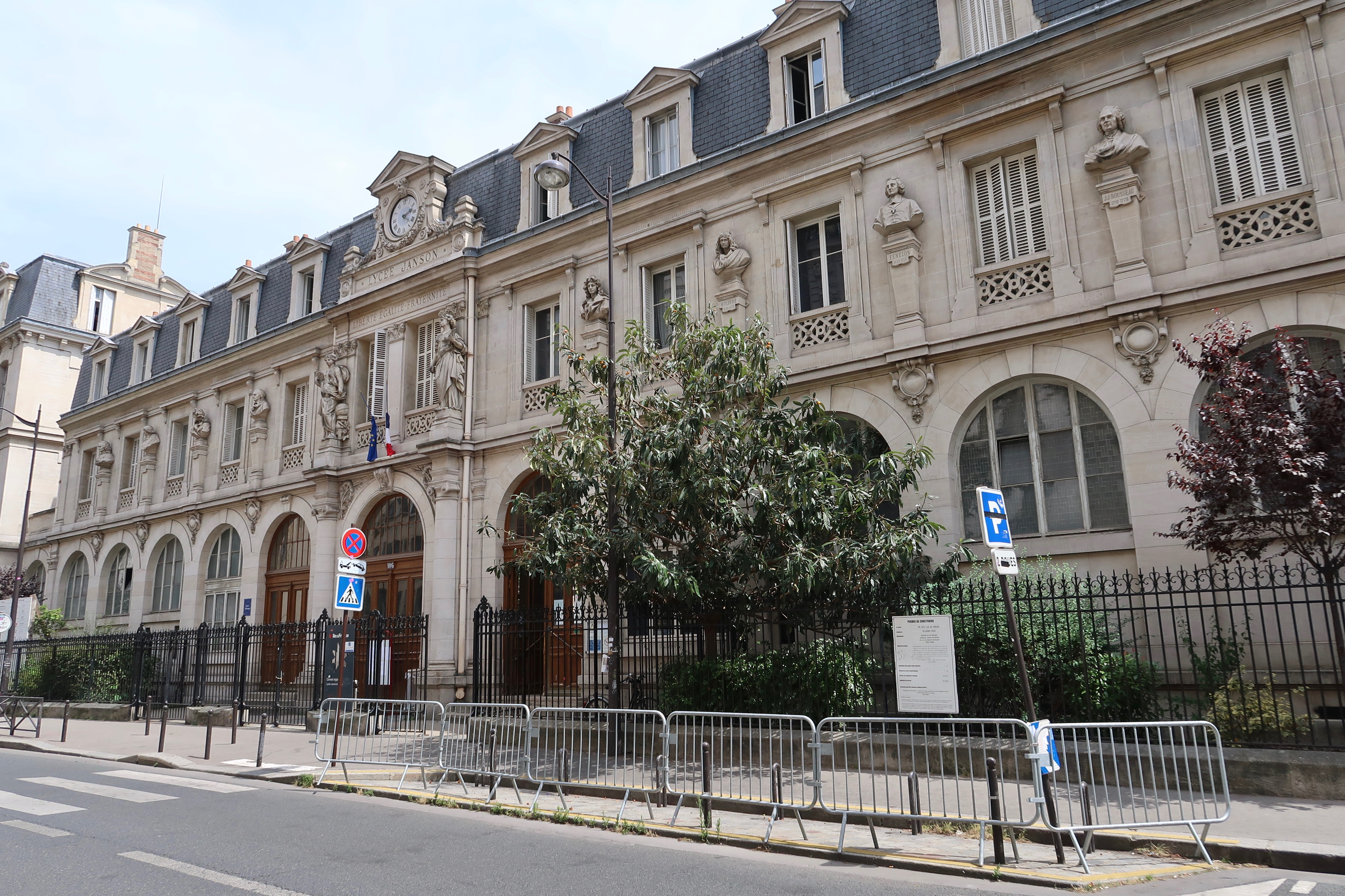 Lycée Janson-de-Sailly, 106 rue de la Pompe (Paris, 16e).